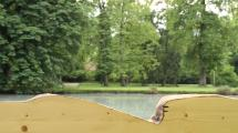 Filigrane - Détail